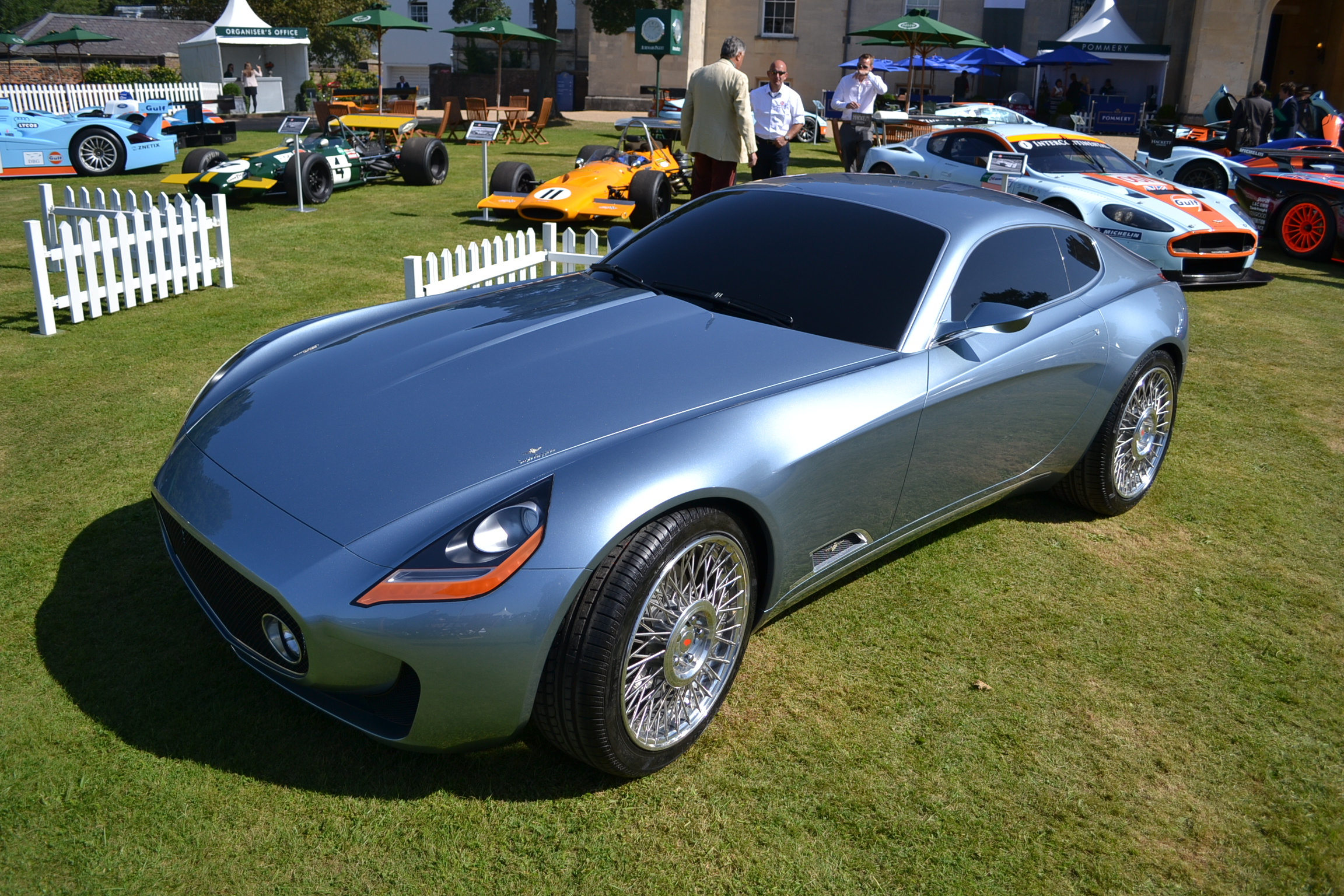 Salon Privé London 2012